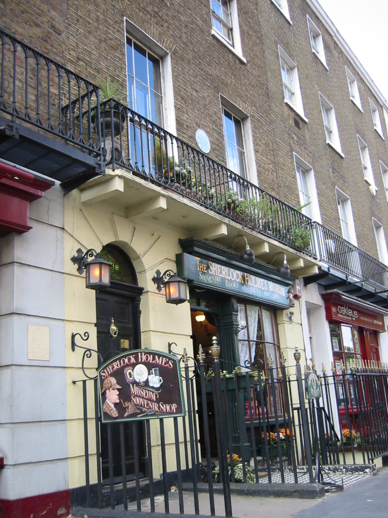 Baker street, London